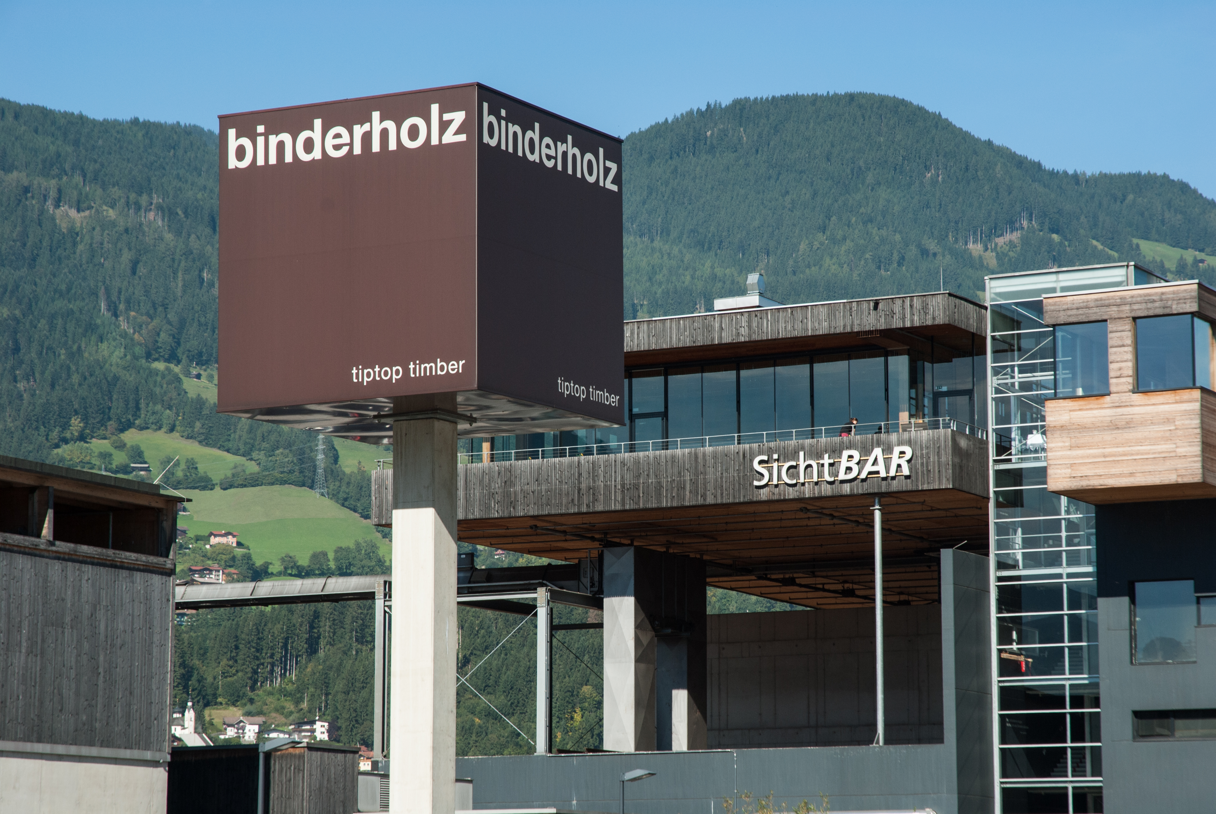 Binderholz in Fügen im Zillertal